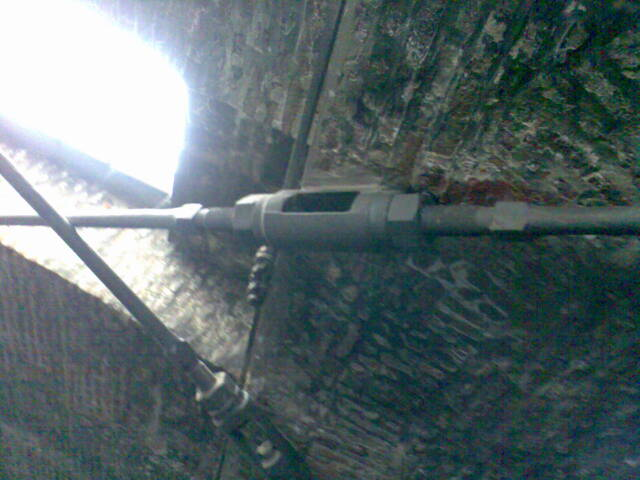 Spannschloss im Malakoffturm der Zeche Hannover